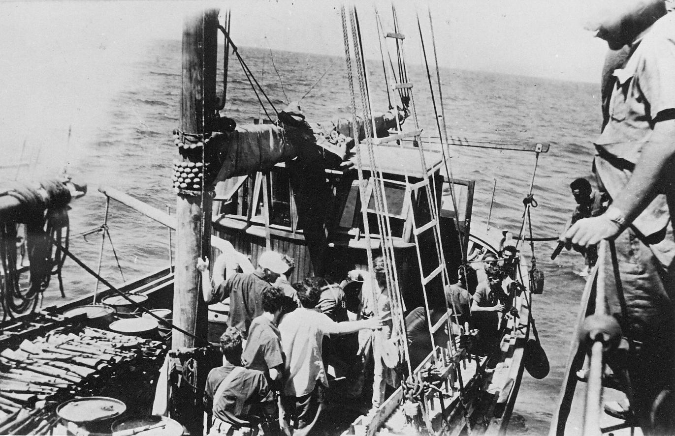 ספינת הנשק לערבים ארג'ירו בעת תפישתה